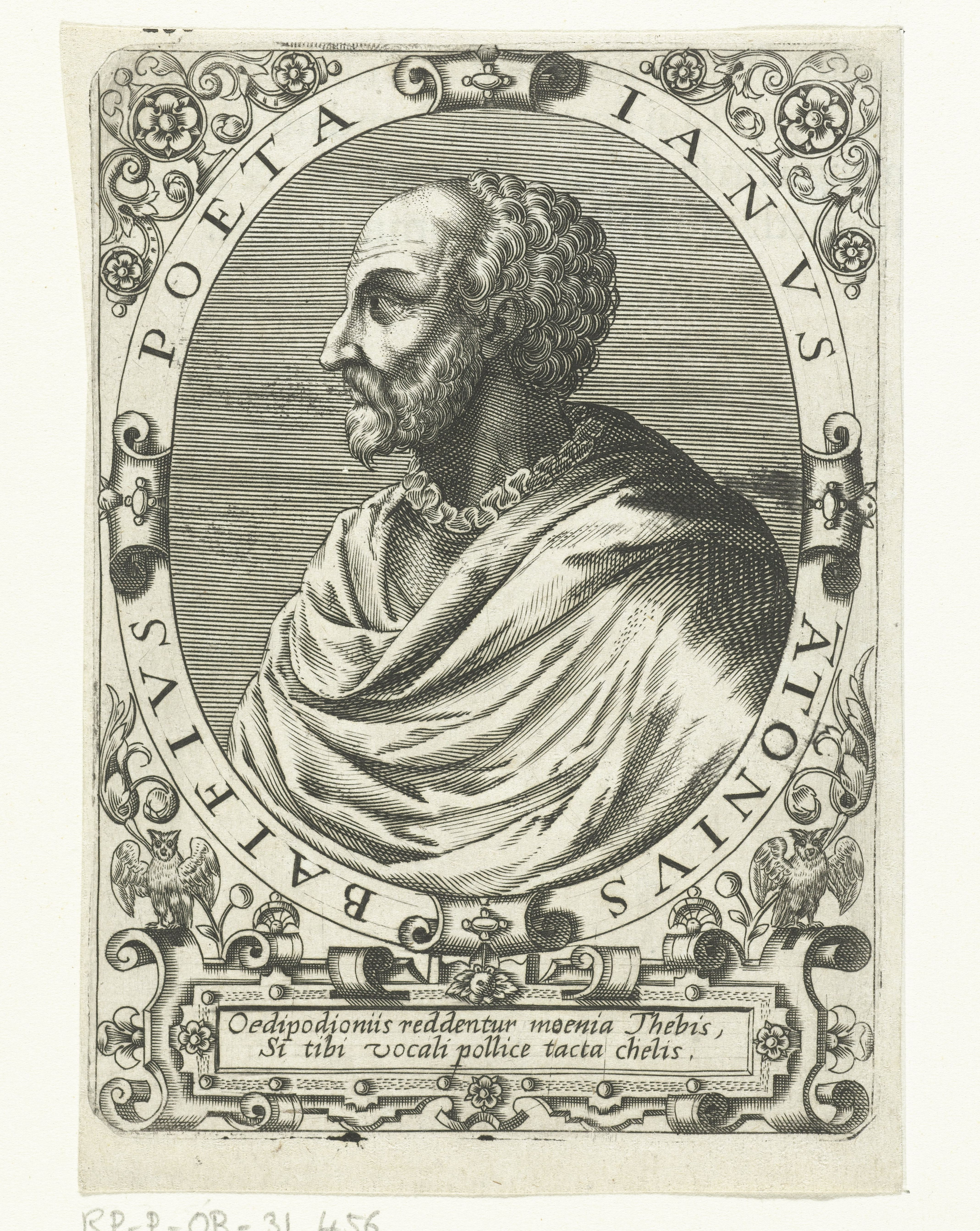 IdentificatieTitel(s): Portret van Jean Antoine de BaïfIanus A[n]tonius Baifius (titel op object)Objecttype: prent boekillustratie Objectnummer: RP-P-OB-31.456Catalogusreferentie: Singer 4559Opschriften / Merken: verzamelaarsmerk, verso, gestempeld: Lugt 2228Omschrijving: Portret van de Franse dichter Jean Antoine de Baïf, in ovaal met randschrift. Met een sierlijst met bladranken en uilen en een cartouche met een Latijns vers onder het portretVervaardigingVervaardiger: prentmaker: Theodor de Bryprentmaker: Johann Theodor de Brynaar ontwerp van: Jean Jacques Boissard (mogelijk)Plaats vervaardiging: Frankfurt am MainDatering: ca. 1597 - ca. 1599Fysieke kenmerken: gravureMateriaal: papier Techniek: graveren (drukprocedé)Afmetingen: plaatrand: h 140 mm × b 100 mmToelichtingGemaakt voor: J.J. Boissard, Icones virorum illustrium doctrina &c eruditione praestanti um contines. Frankfurt am Main: de Bry, 1597-1599.OnderwerpWie: Jean Antoine de BaïfVerwerving en rechtenVerwerving: onbekendCopyright: Publiek domein